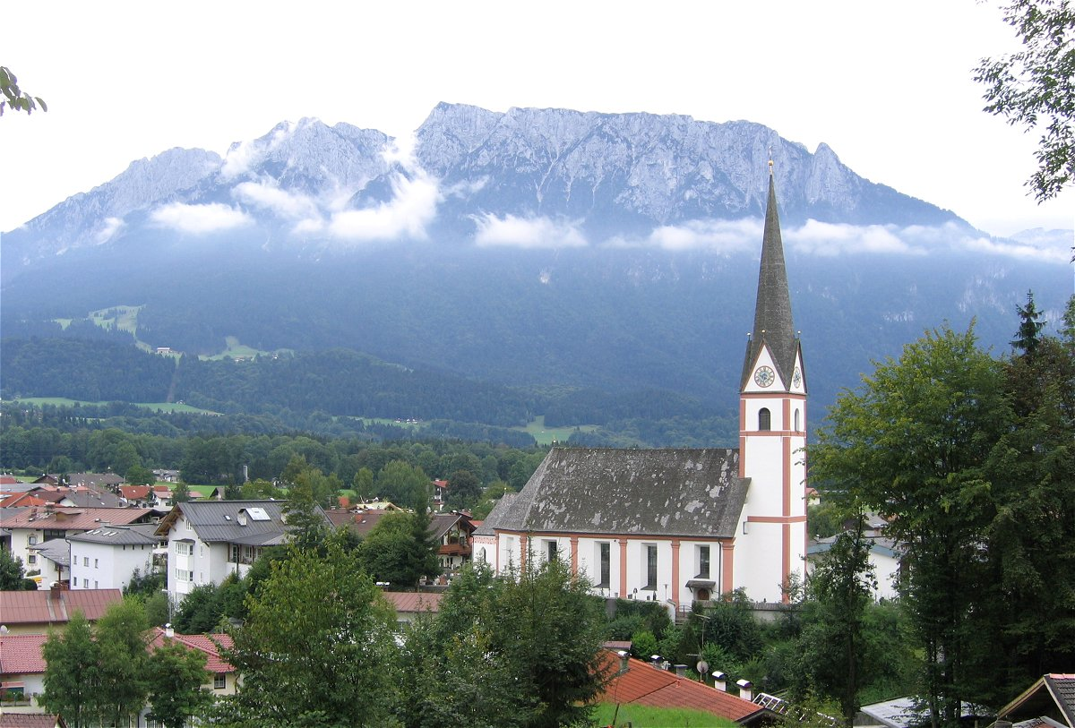 Niederndorf (Österreich), Pfarrkirche St. Georg von Nordwesten, Zahmer Kaiser